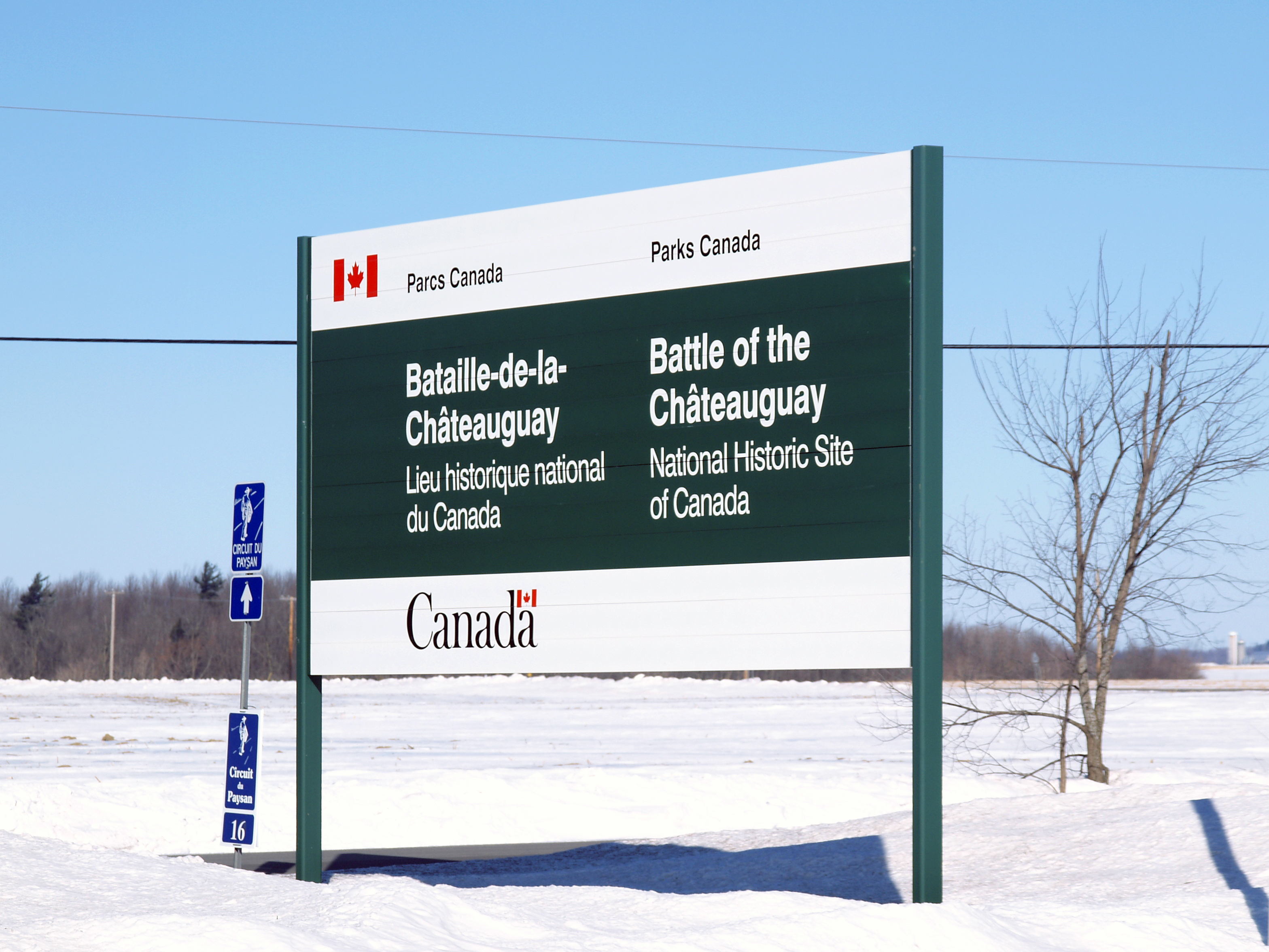 Châteauguay, Montérégie (Québec) - Panneau des Parcs Canada